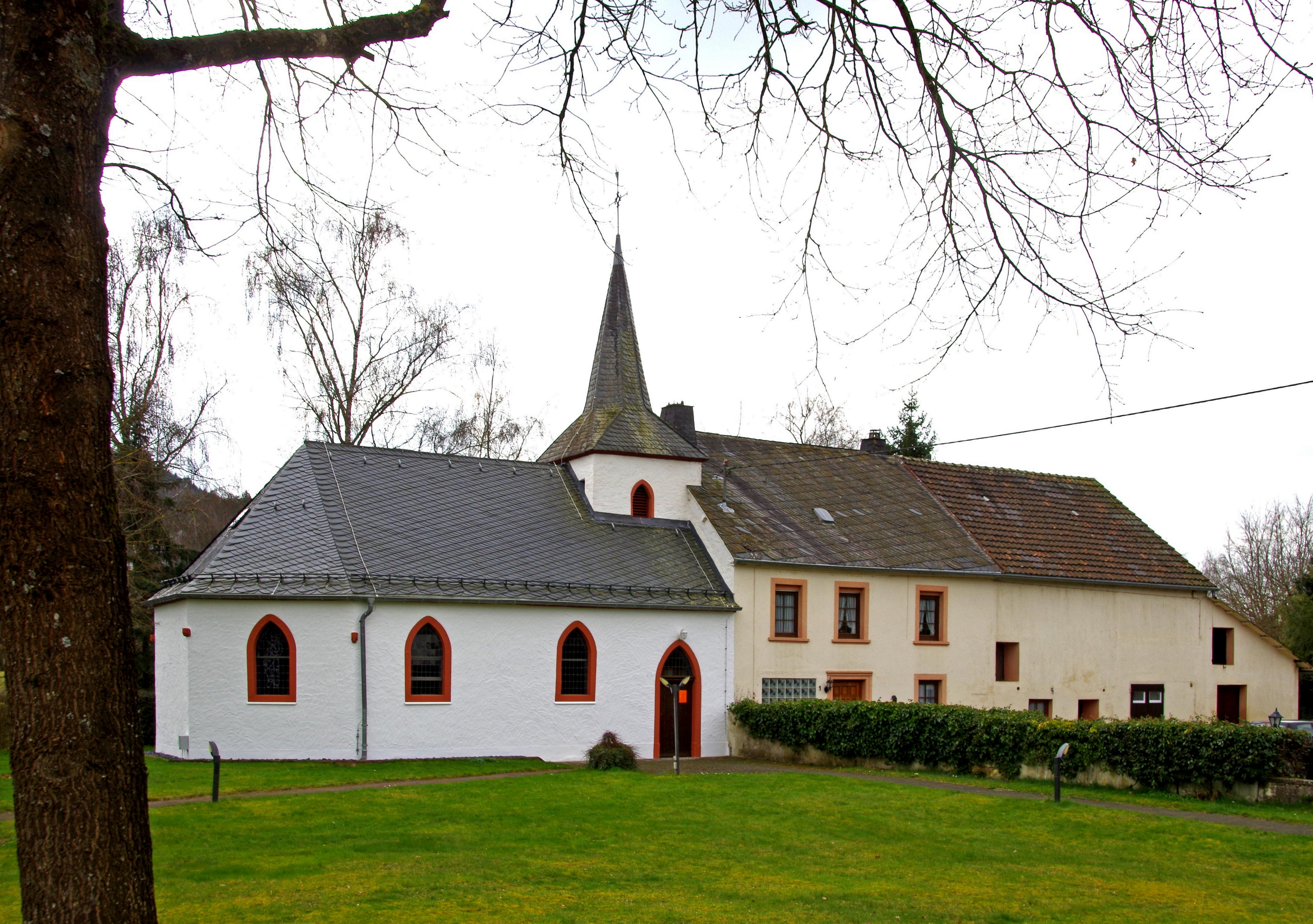 St. Bartholomäus (Watzerath), Spätgotische Kapelle mit angebautem Frühmessehaus